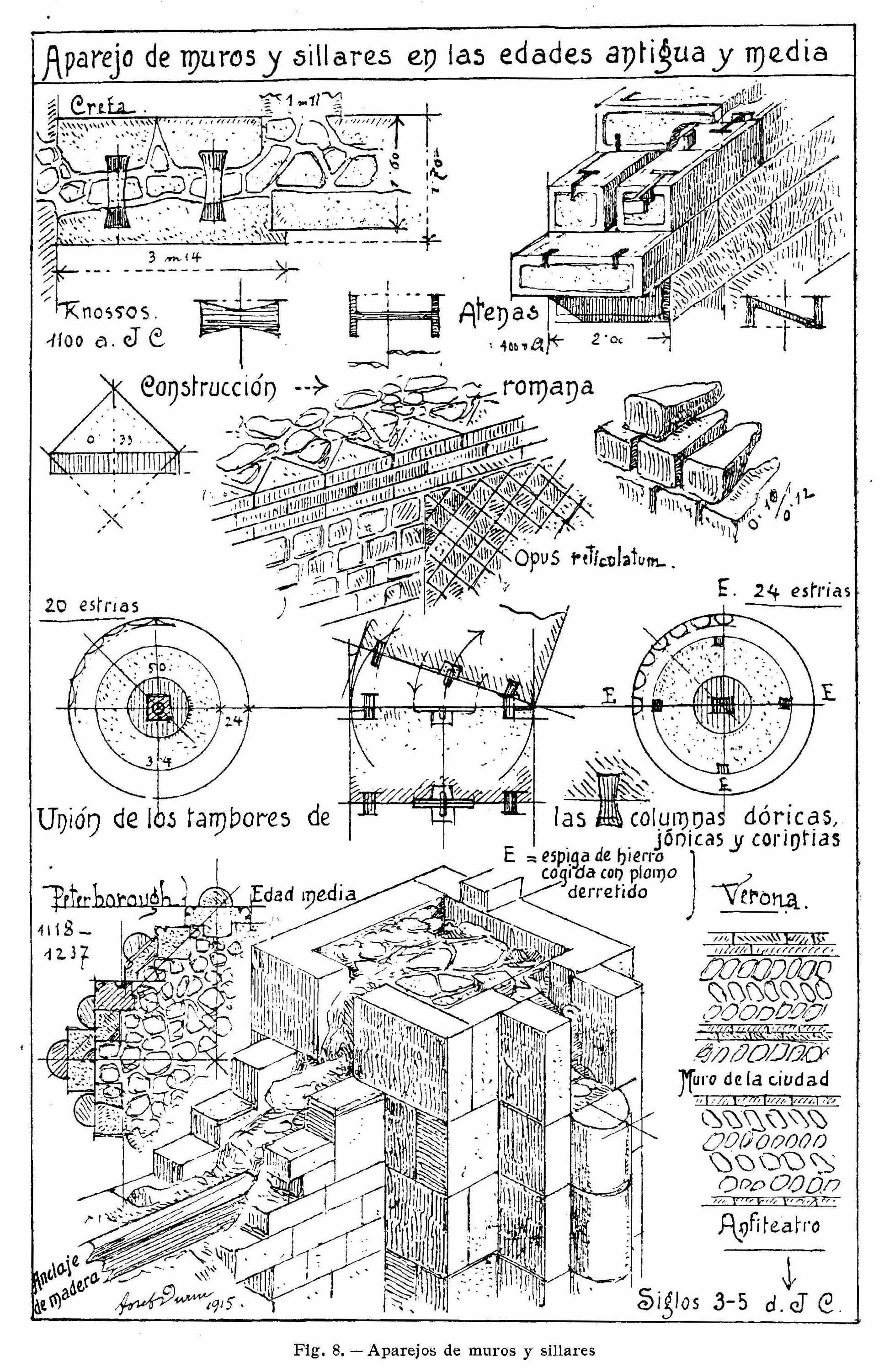 Aparejos de muros y sillares (textos del dibujo en español)